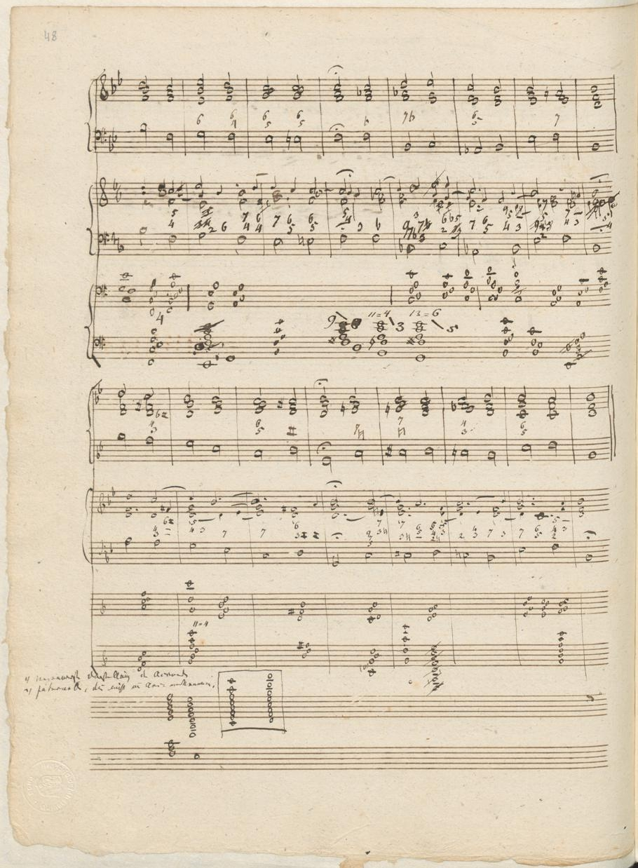 Eine Seite aus dem Skizzenbuch V von Robert Schumann mit Generalbass-Studien